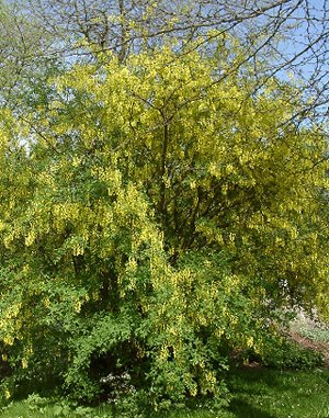 Habitus von Goldregen